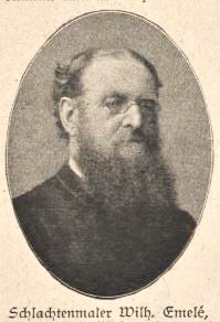 Wilhelm Emelé (1830-1905) deutscher Maler